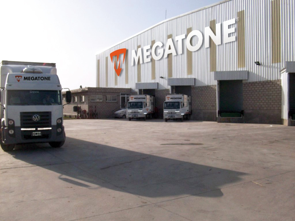 Centro de Operaciones Logísticas de Megatone Bazar Avenida, en Campana (Buenos Aires)